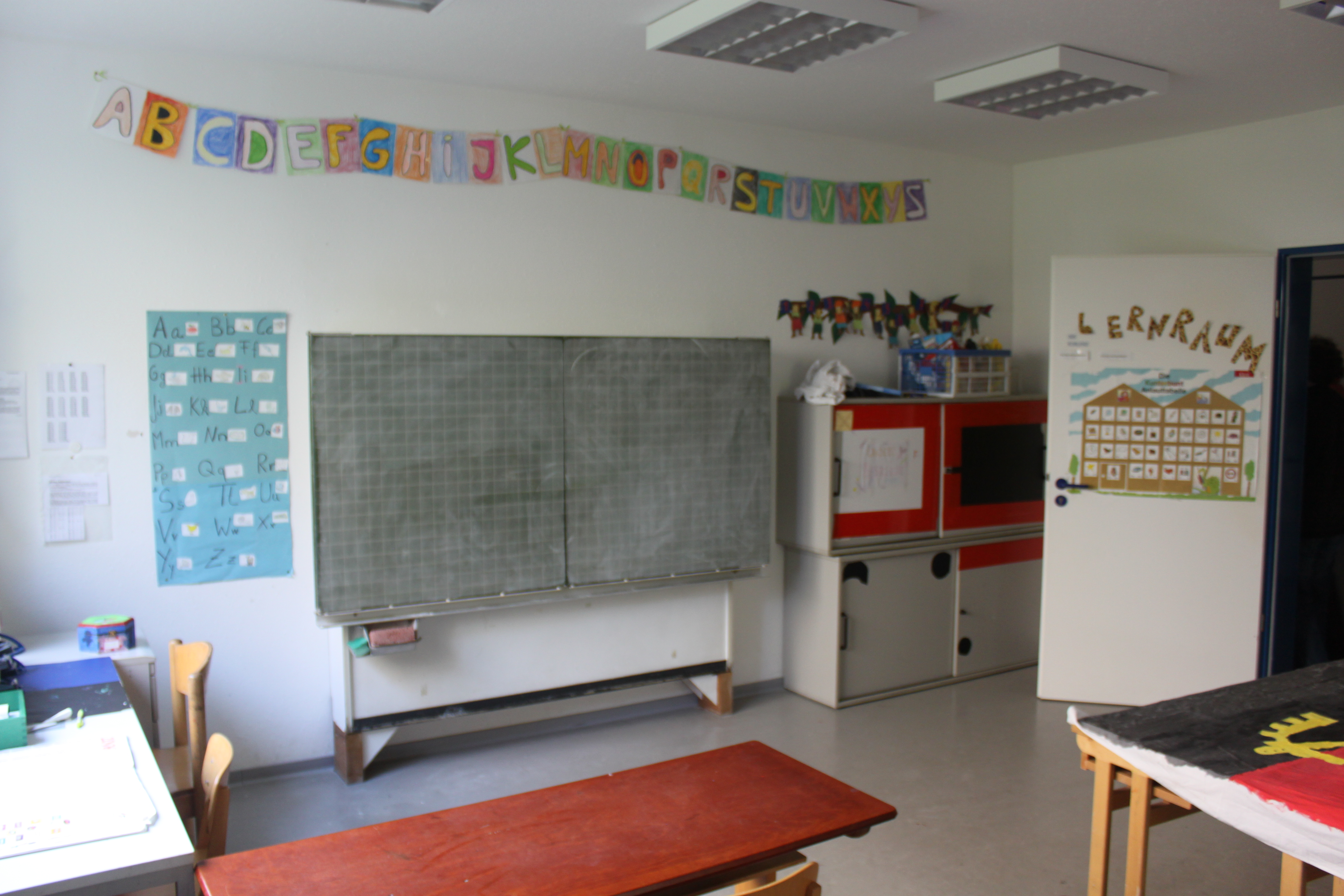 Friedensdorf International in Oberhausen Ein Lernraum